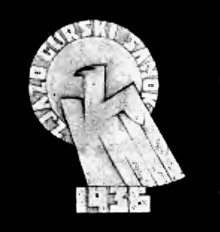 Emblemat Zjazdu Górskiego w Sanoku 14–17 sierpnia 1936.